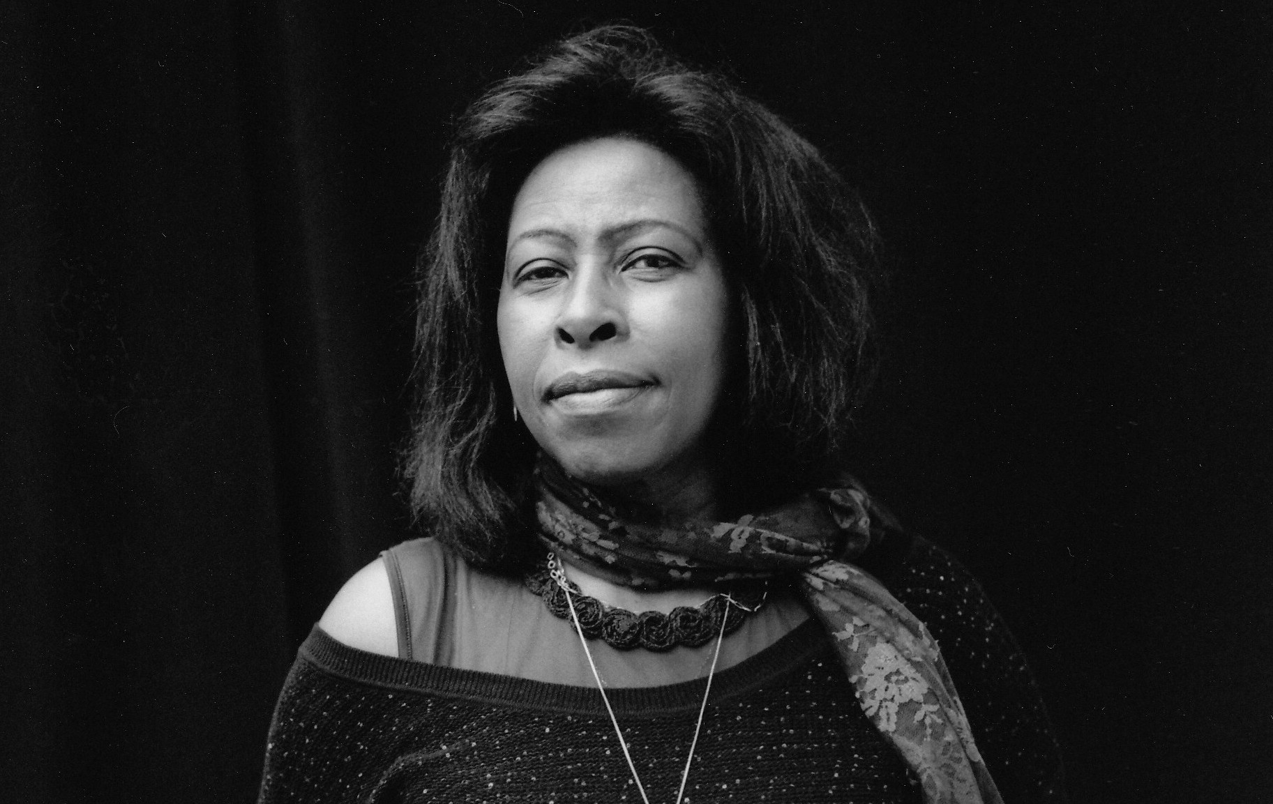 Scholastique Mukasonga. Photo de Thibaut De Corday